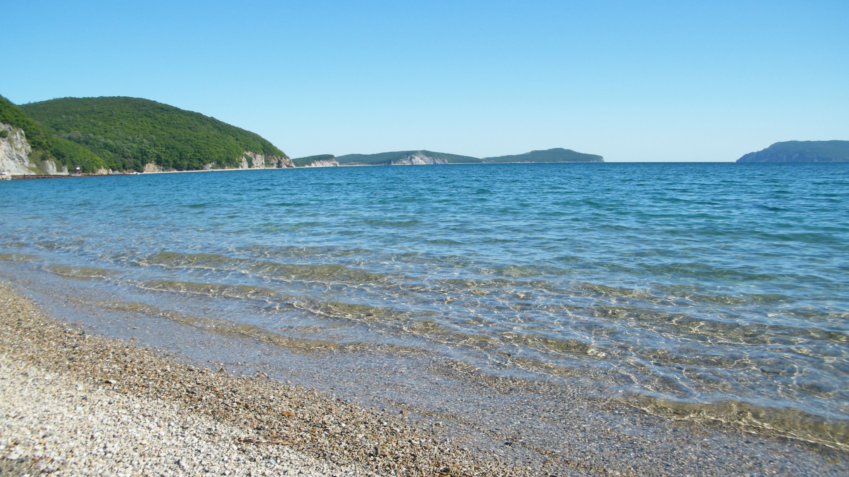 Приморский край, Ольгинский район, залив Владимира, полуостров и мыс Балюзек.